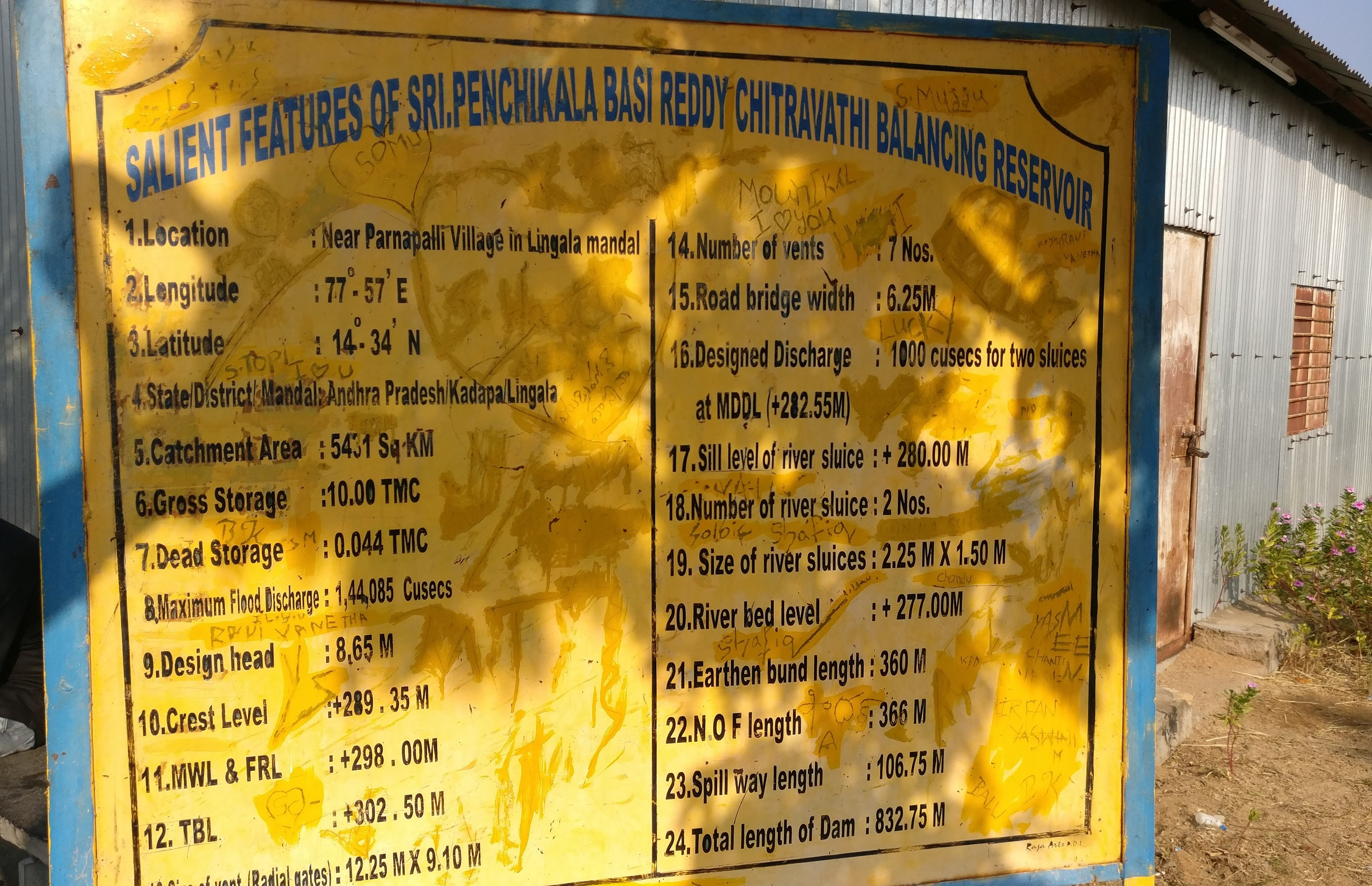 పార్నపల్లి దగ్గరి చిత్రావతి బాలన్సింగ్ రిజర్వాయర్